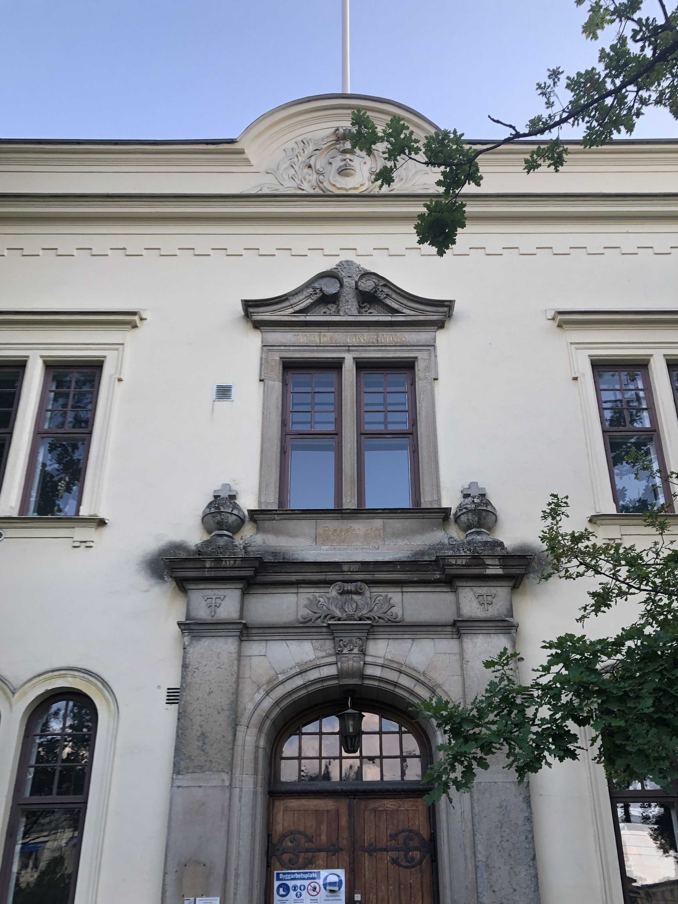 Tiunda tingshus. nybyggnadsår 1903 Carl Axel Ekholm (Arkitekt) Tiunda tingslags tingshusbyggnadsskyldige (Byggherre)